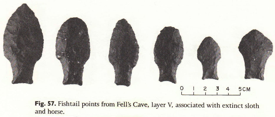 Puntas de proyectil "cola de pescado", encontradas en el estrato V de la Cuva Fell, al sur de Chile.